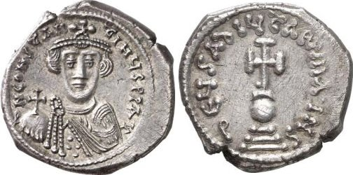 Constans II Hexagramma aus dem Jahr 642